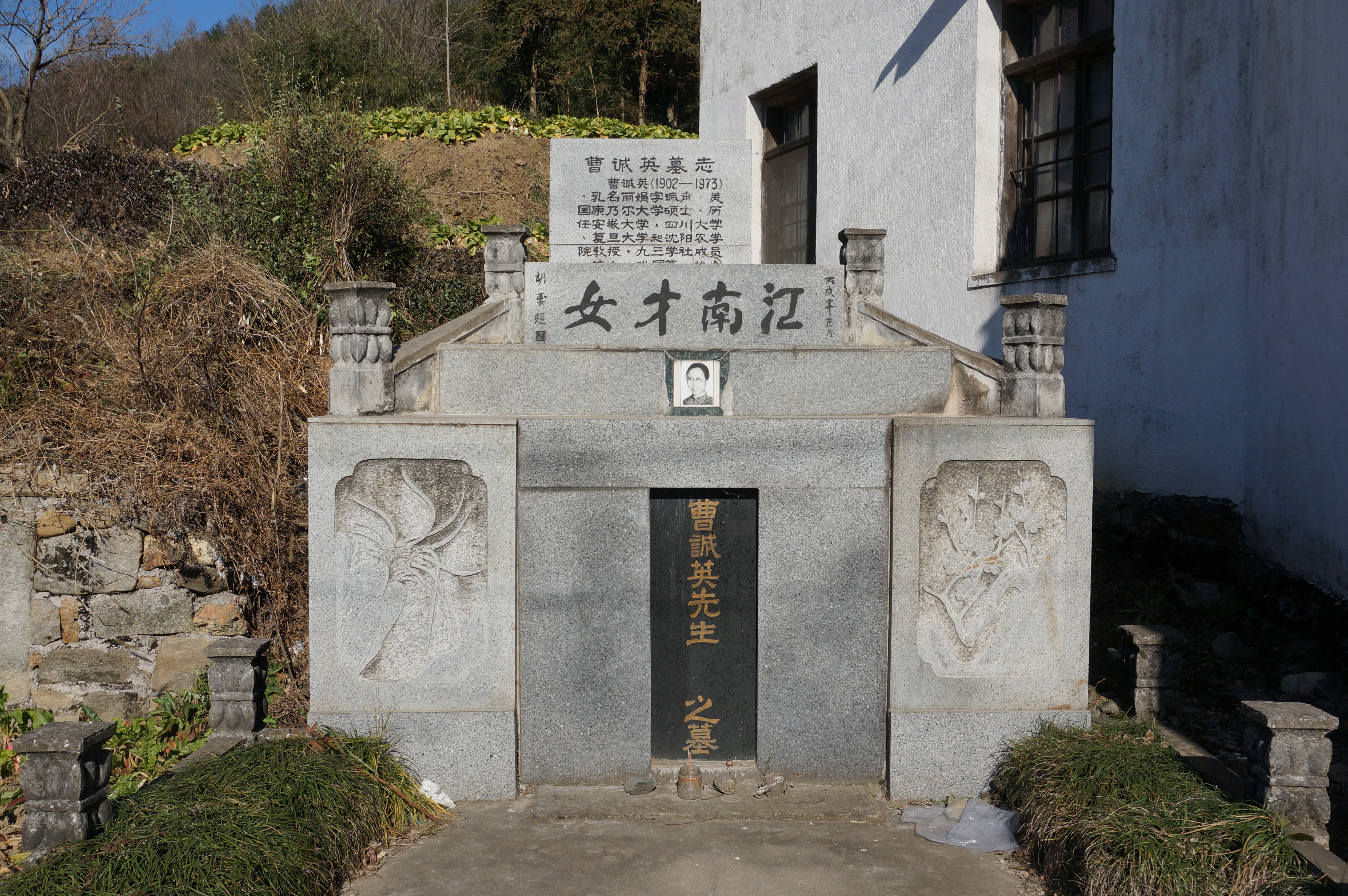 绩溪旺川村曹诚英墓。